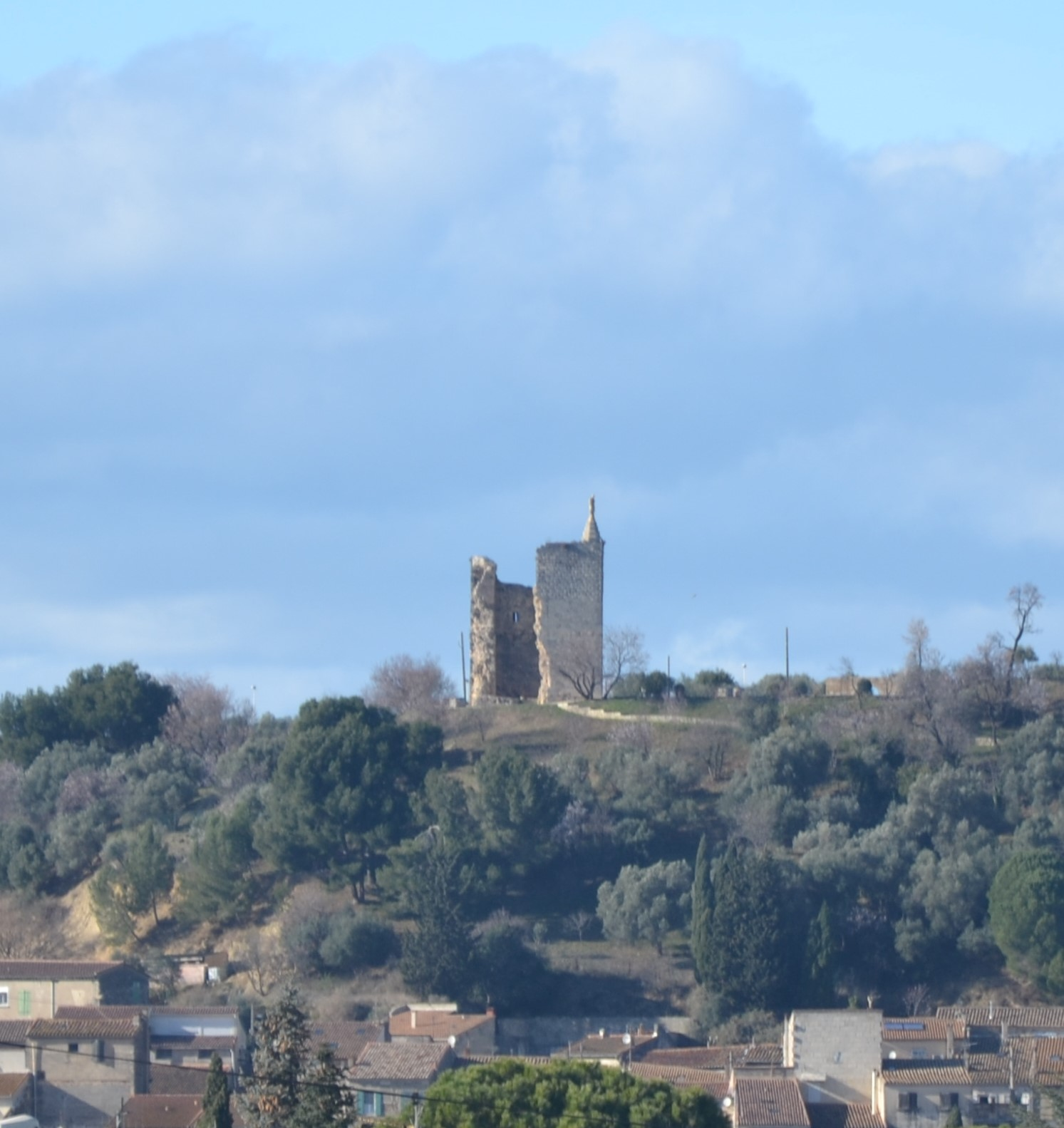 Tour à Bellegard